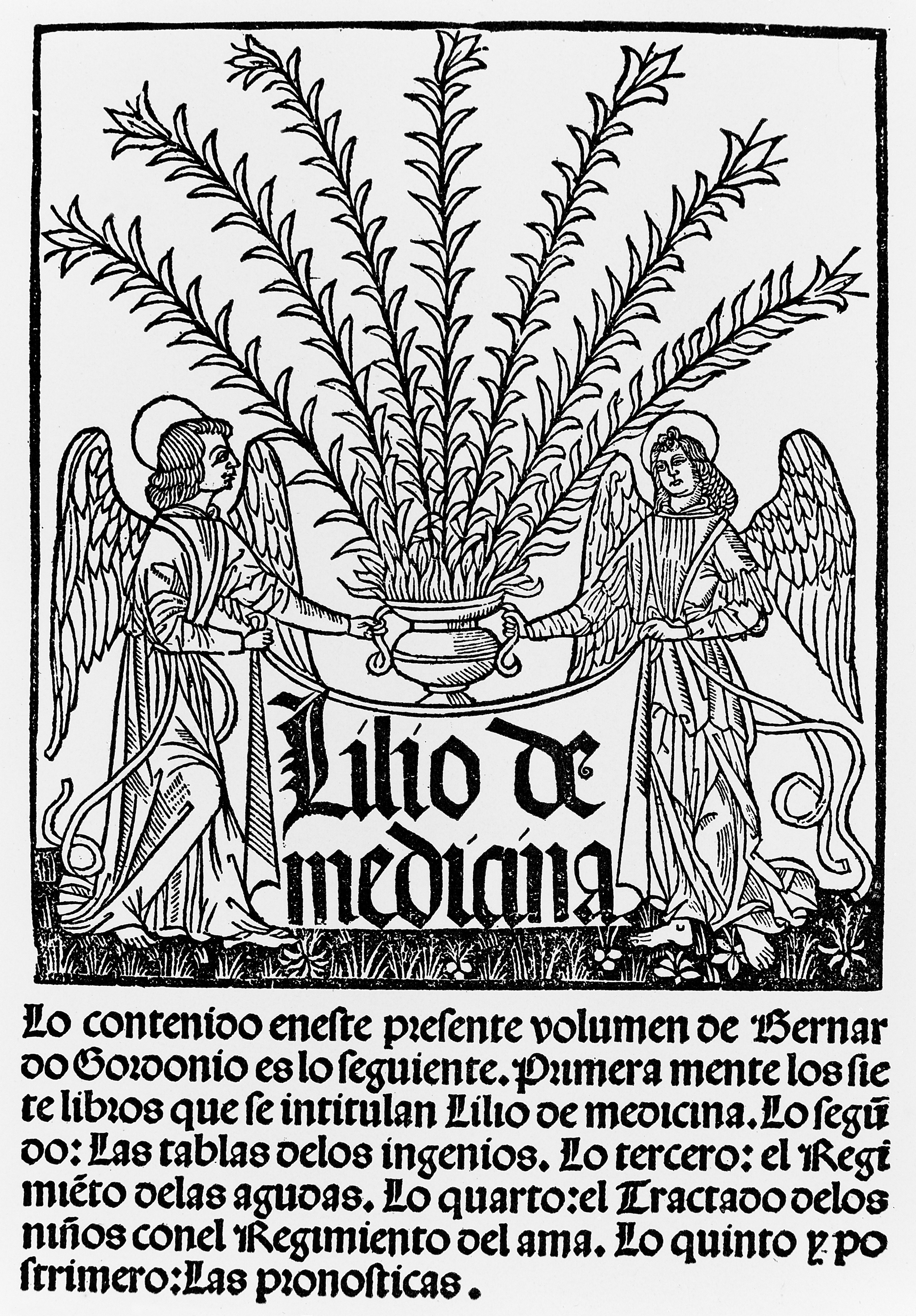 Rare Books Keywords: Bernard de Gordon